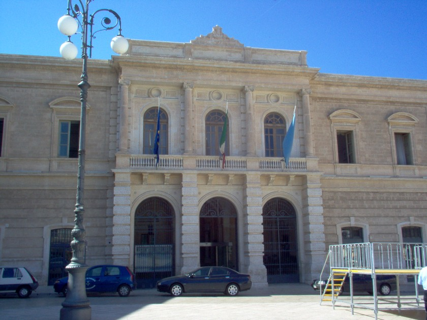 Palazzo del Bali, Fasano (Brindisi)